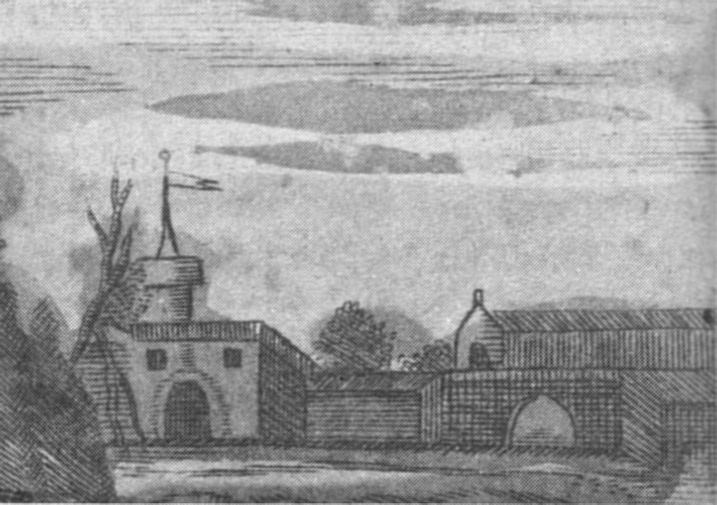 Kupferstich mit der Abbildung des Hauses Langendonk